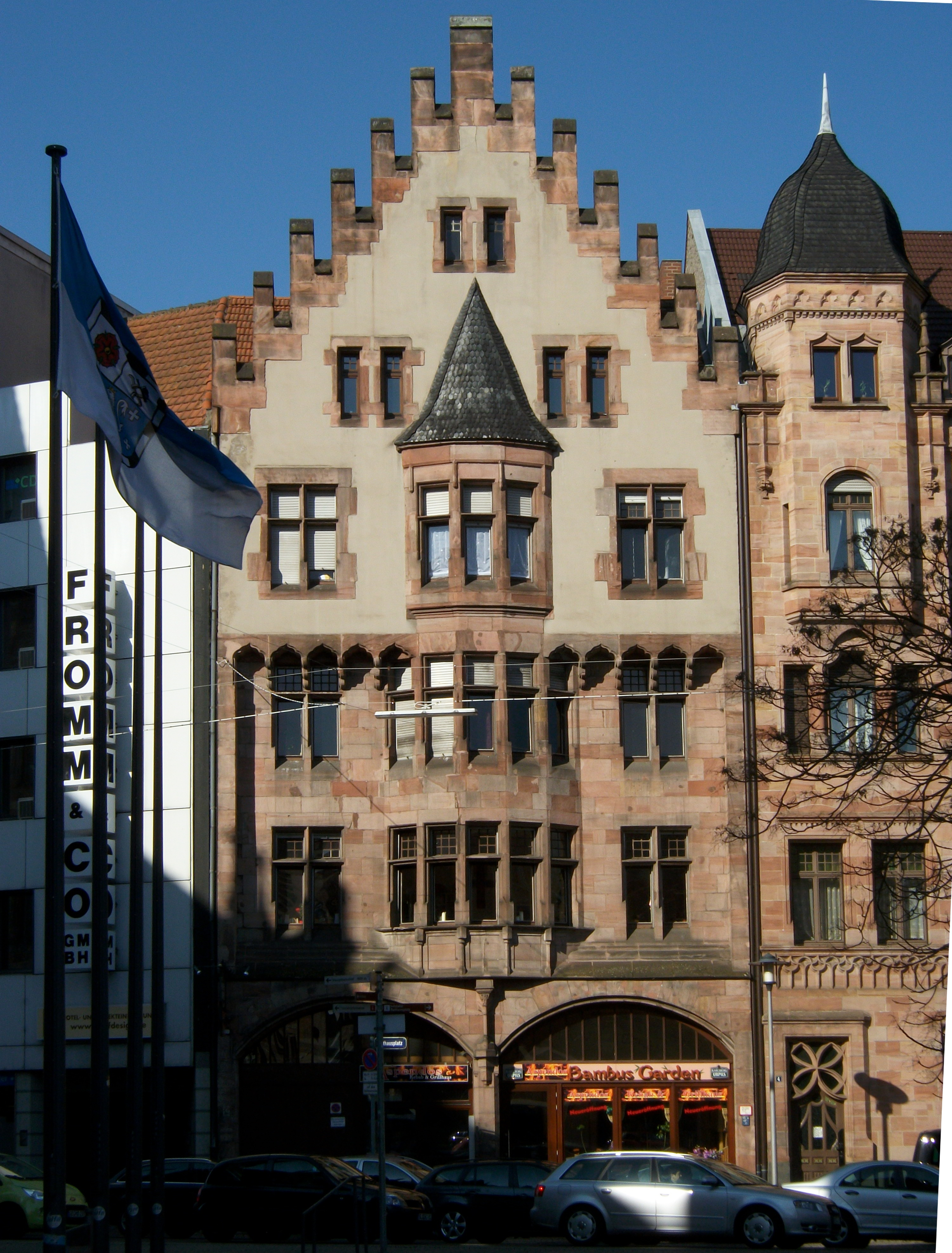 Rathausplatz Saarbrücken